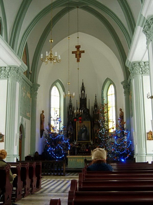 Бабруйск. Інтэр'ер касцёла